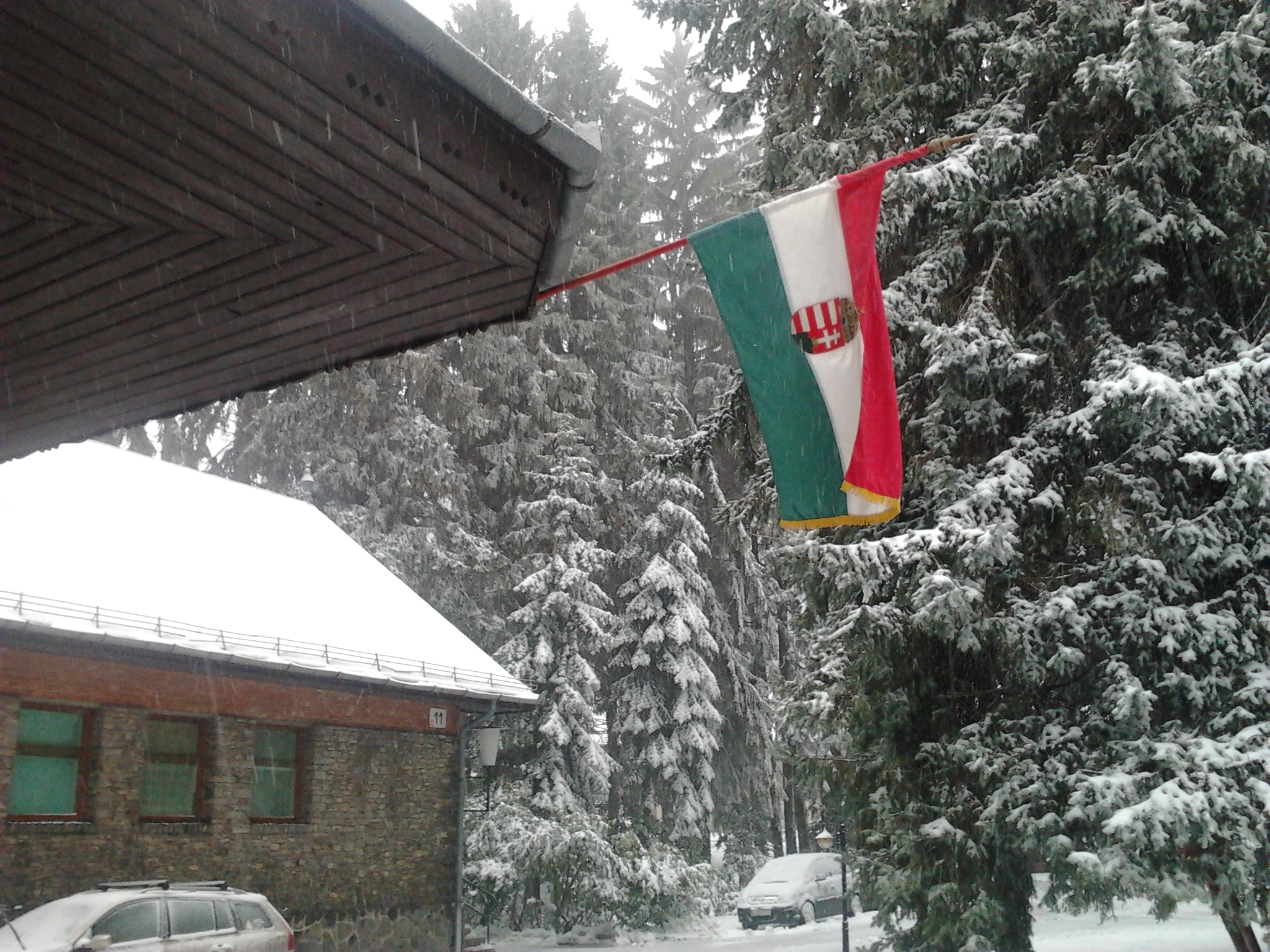 A kép 2013.03-14-én készült Magyarországon.